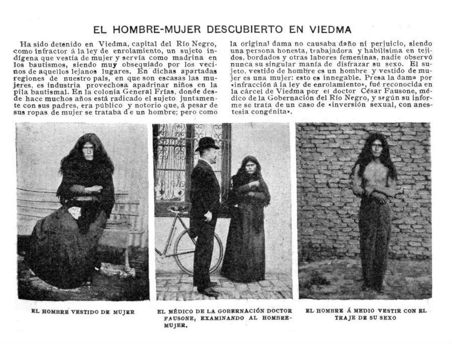 Crónica de Caras y Caretas del 17 de mayo de 1902, contando el caso de una travesti indígena detenida en Río Negro por "infracción a la ley de enrolamiento".